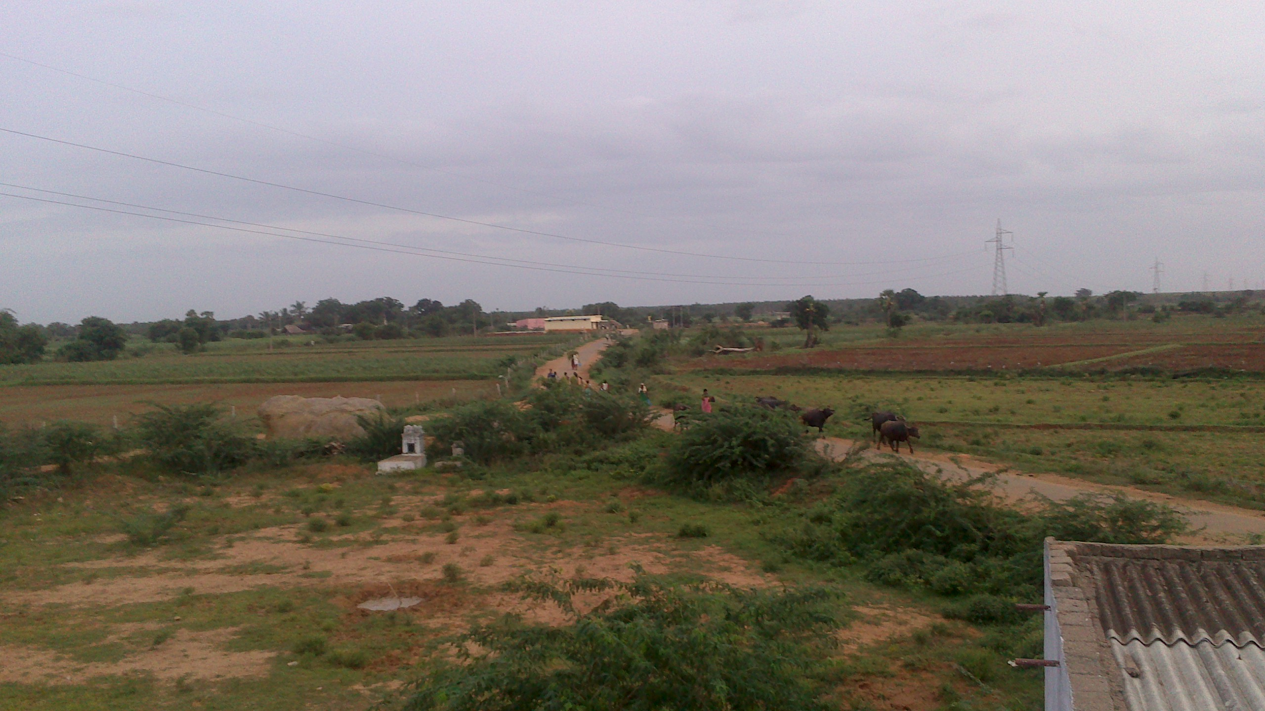 G